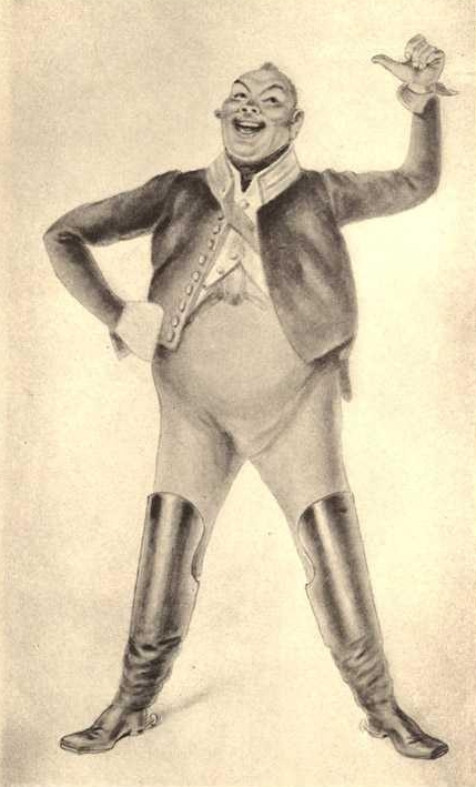 Городничий Антон Антонович Сквозник-Дмухановский